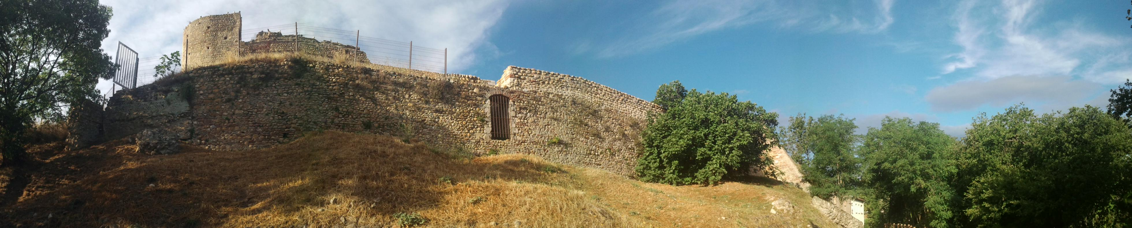 Remparts nord-est du château et chapelle Saint-Martin de Canet-en-Roussillon